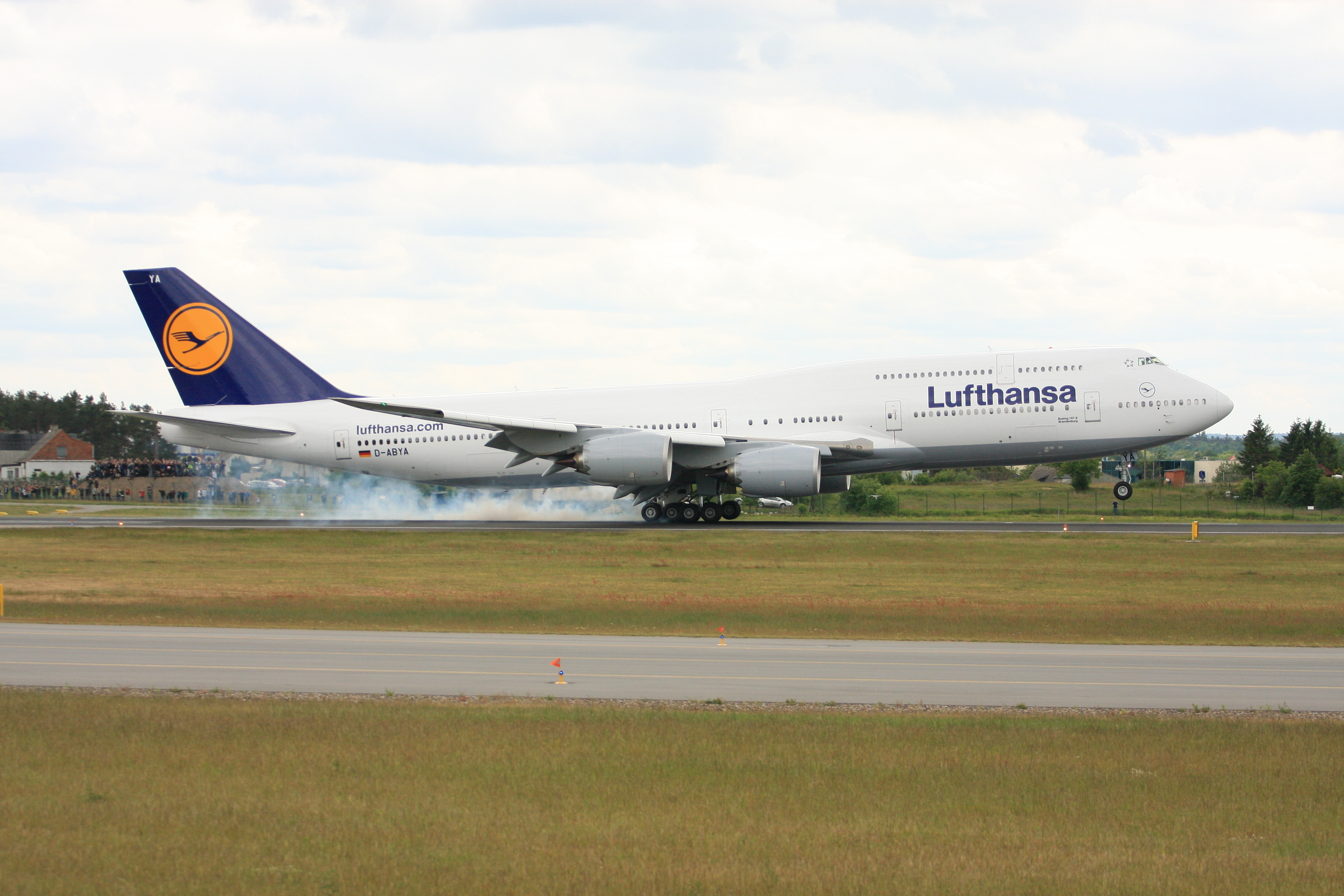 Boeing 747-800 Lufthansa